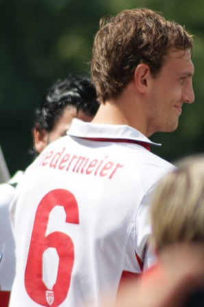 VfB Opening 2010